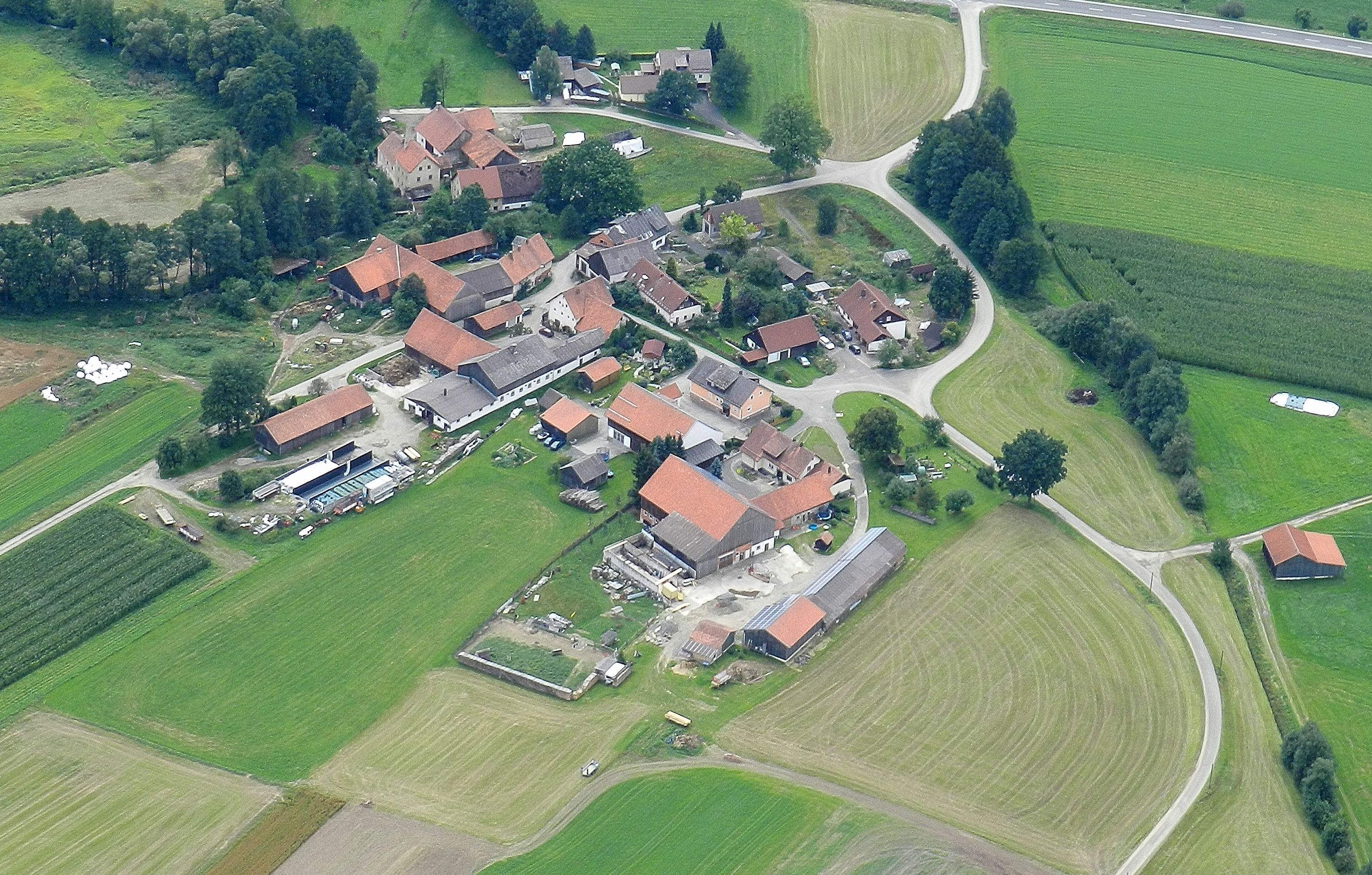 Obereppenried; Markt Winklarn, Landkreis Schwandorf, Oberpfalz, Bayern